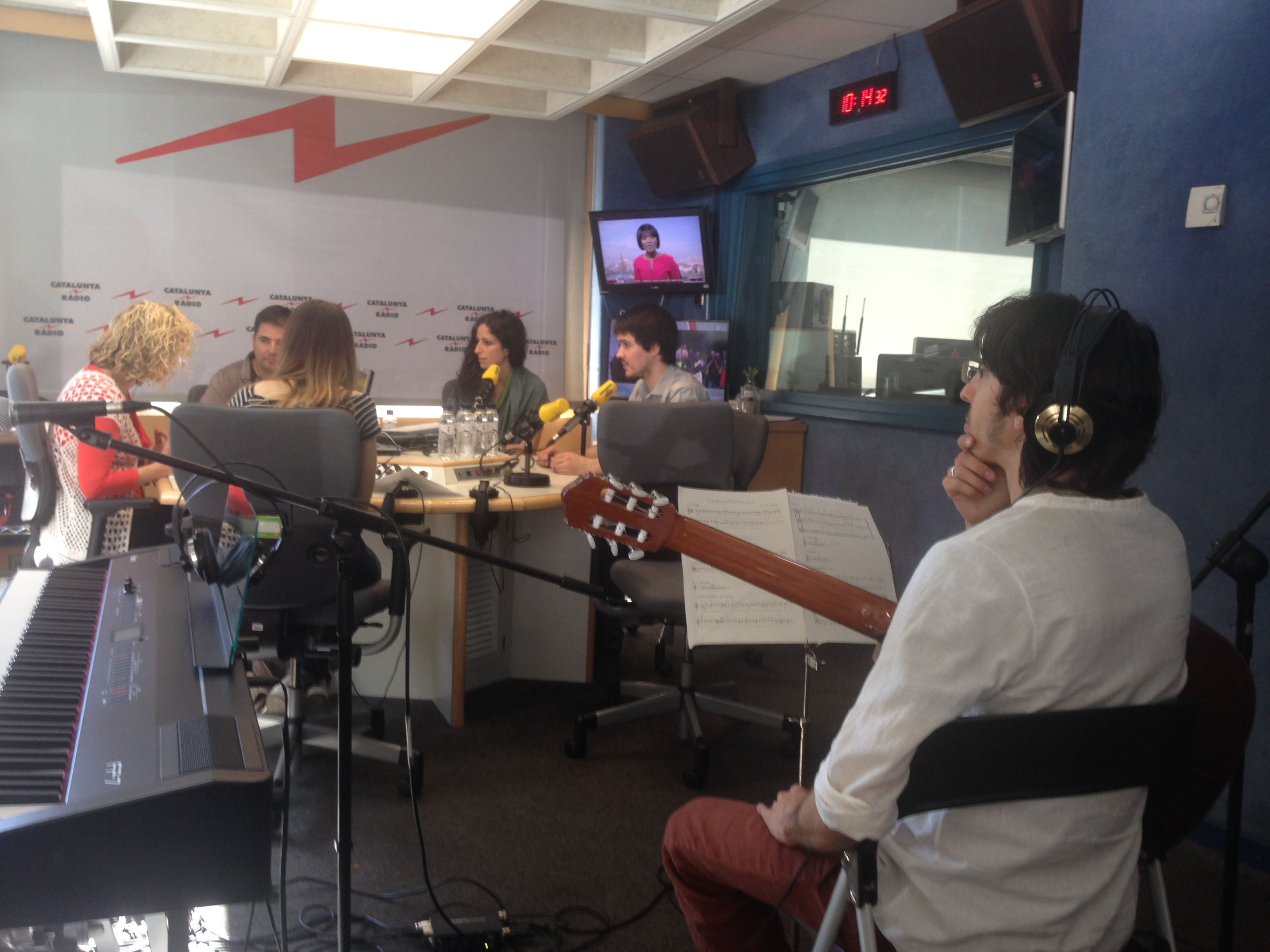 El matí de Catalunya Ràdio